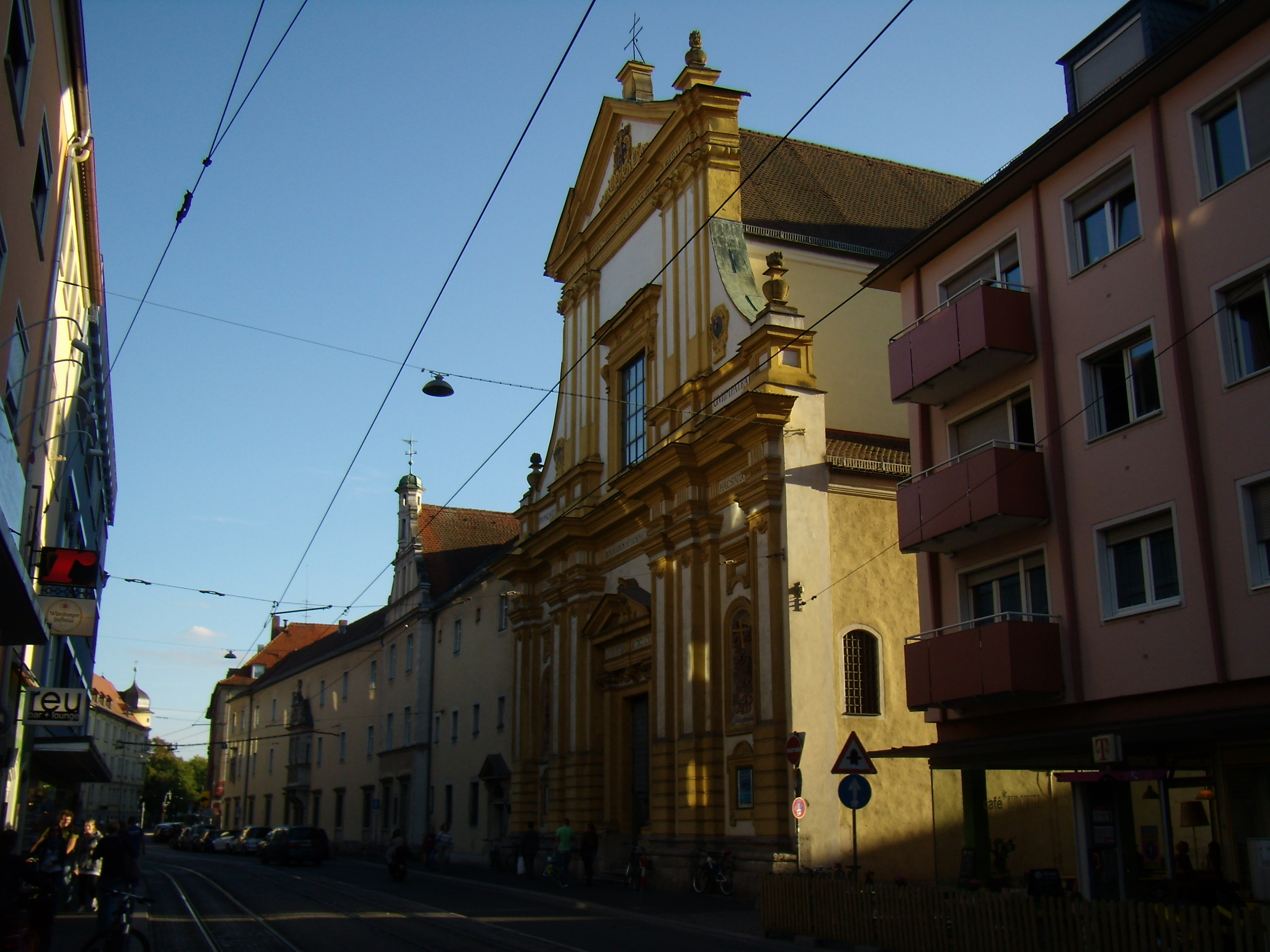 Würzburg - Sanderstraße 12 Reuererkloster